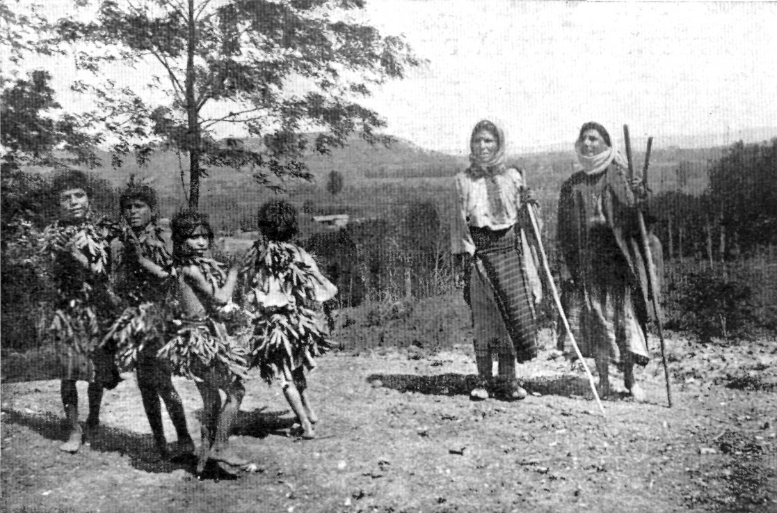 Paparude din comuna Breasta (Dolj) (1908)